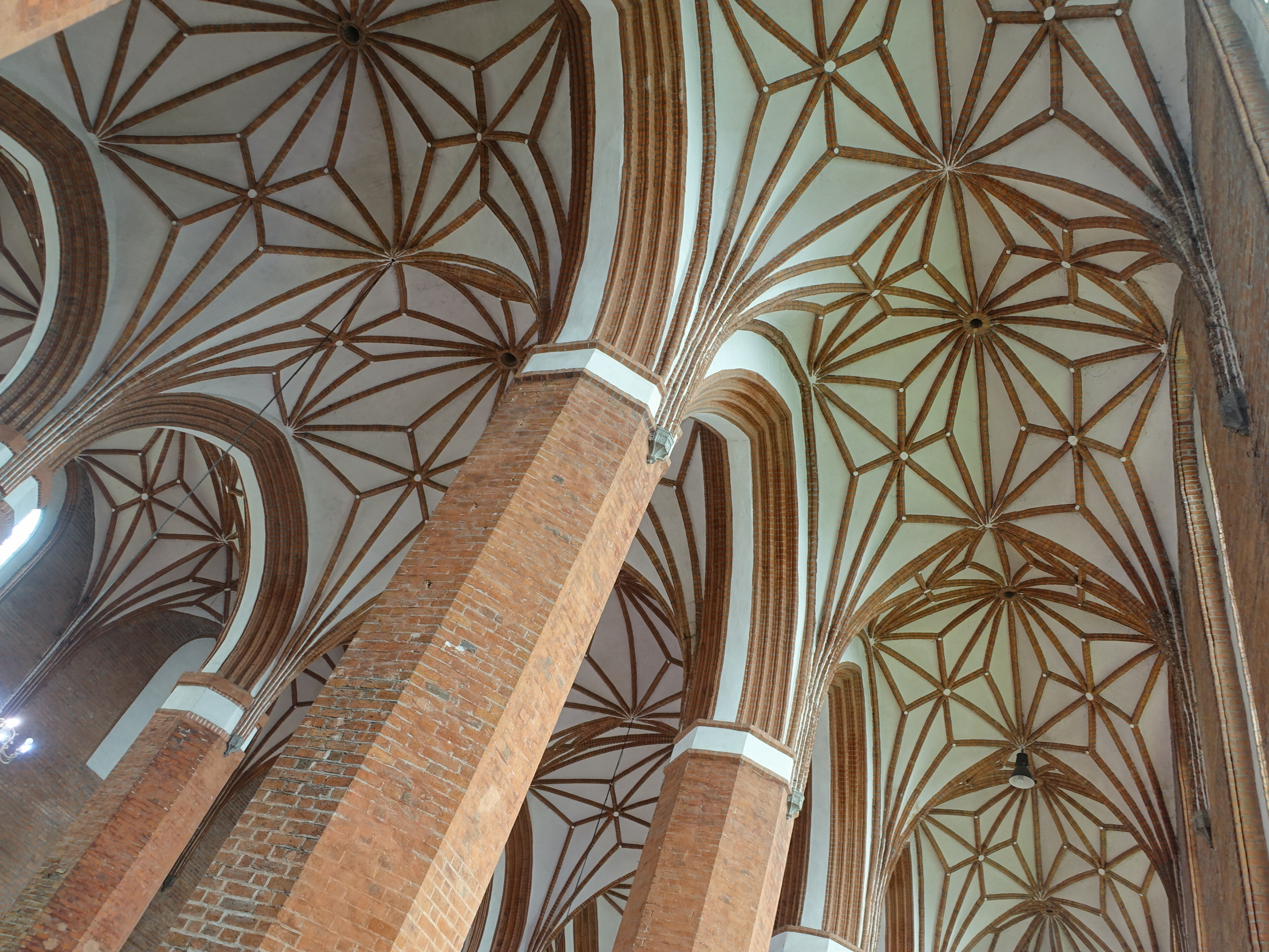 Gewölbe der Katharinenkirche in Braunsberg